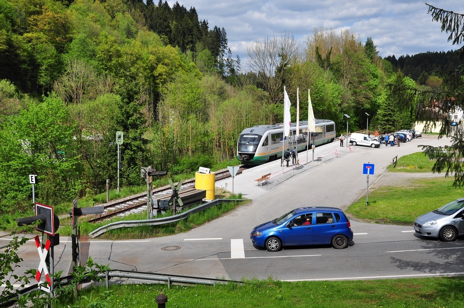 Ein Desiro im Einsatz auf der Ilztalbahn Passau - Freyung am sanierten Haltepunkt Fürsteneck